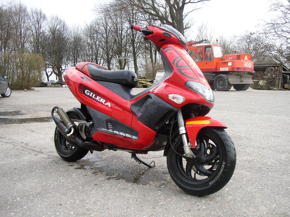 Deze foto is genomen door Gebruiker:Necromander.